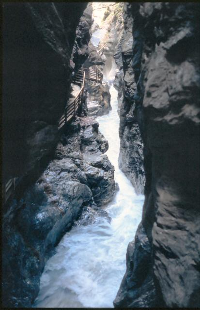 In der Liechtensteinklamm bei Sankt Johann im Pongau, Österreich